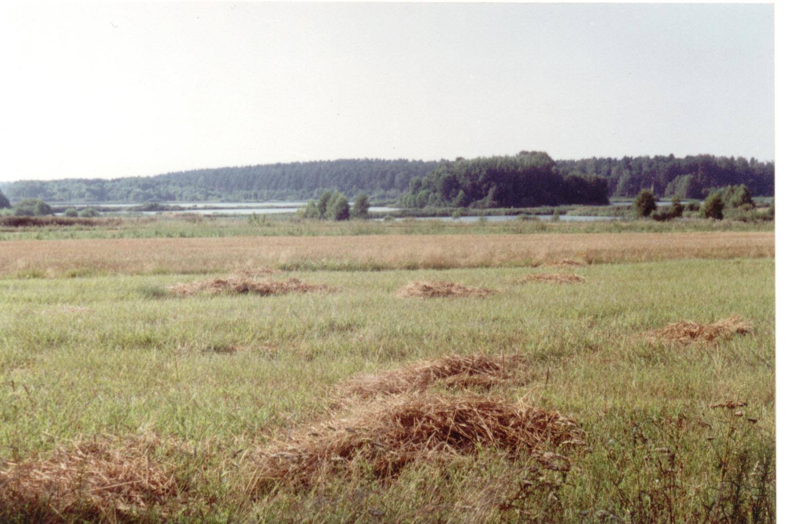 Łąki we wsi Krzemienica (powiat tomaszowski)